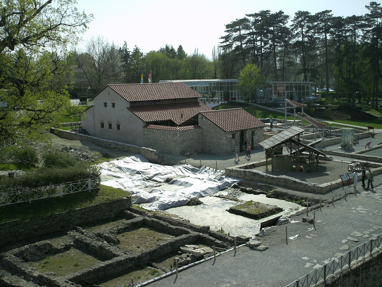 Rekonstruktion eines Wohn- und Wirtschaftshauses im Archäologiepark Carnuntum-Österreich